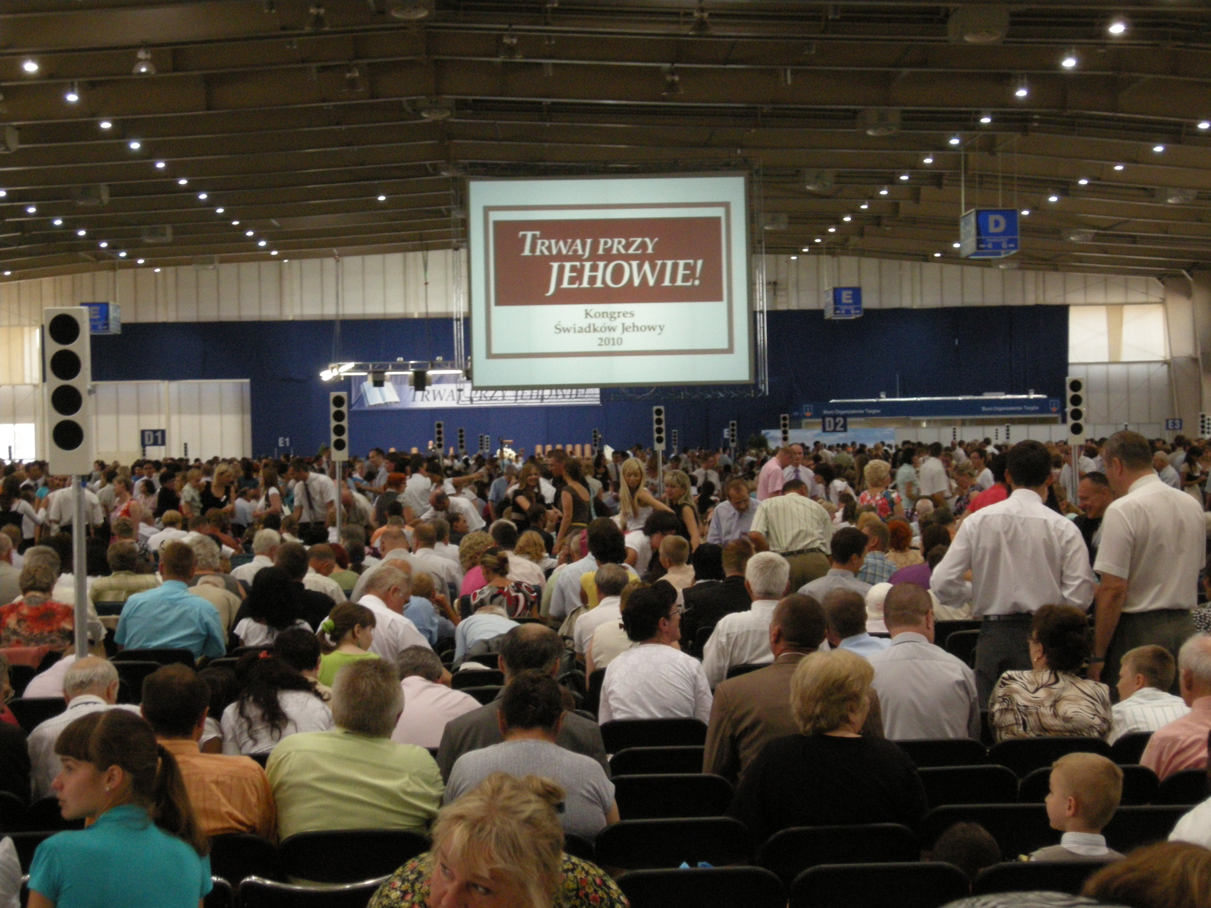 Zgromadzenie okręgowe "Trwaj przy Jehowie!" w poznaniu w Polsce 2010